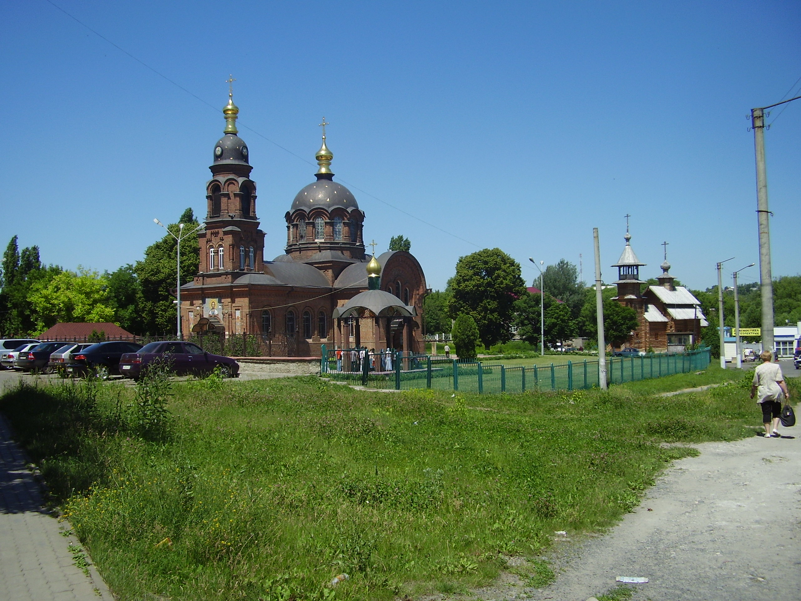 Старый Оскол. Собор Александра Невского